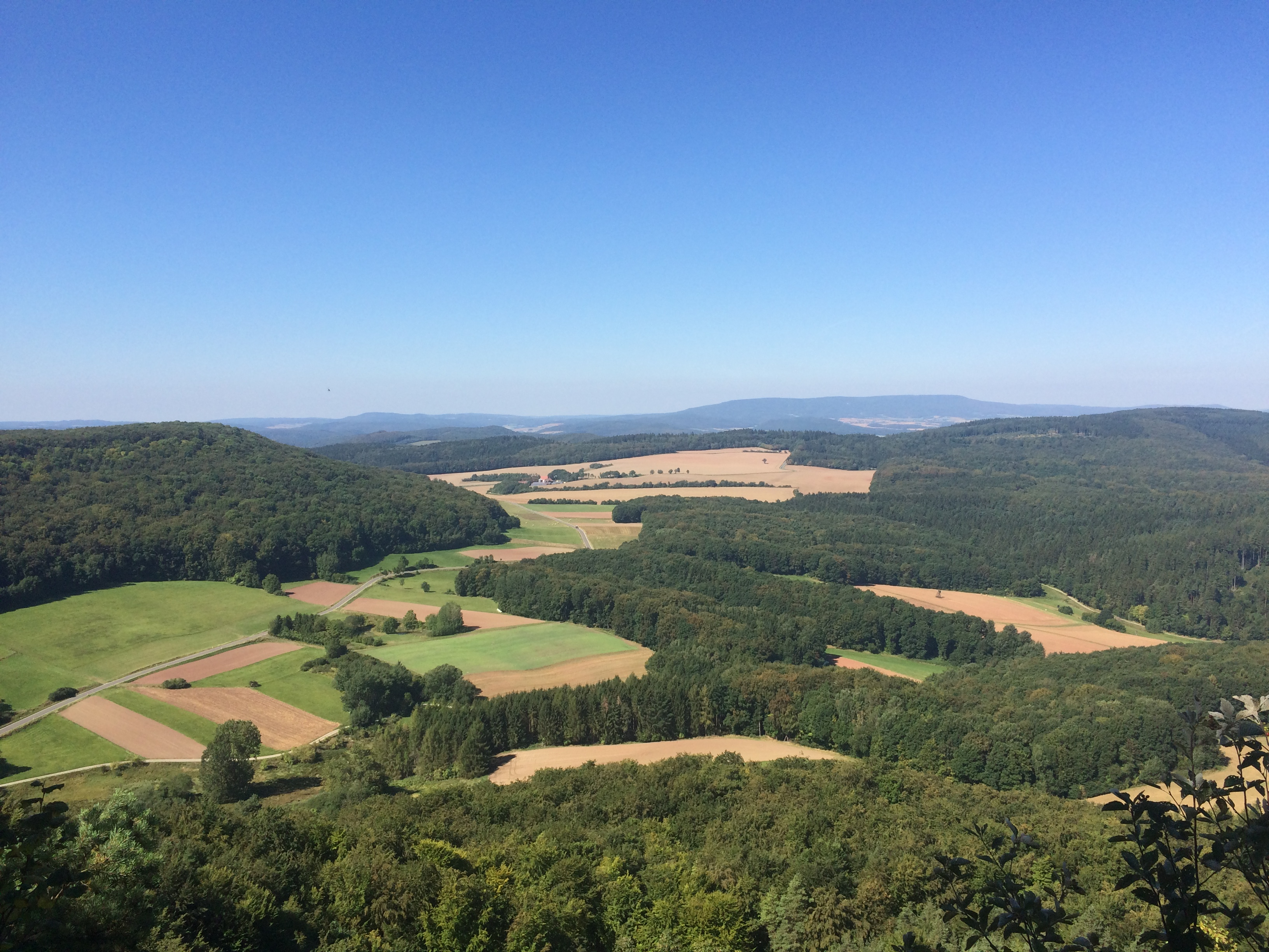 Blick Aussichtspunkt Rabenkuppe (515 m) Richtung Domäne Lautenbach; Werra-Burgen-Steig Hessen (X5H), links der Schieferstein und rechts der Schlierbachswald mit dem Hundsrück